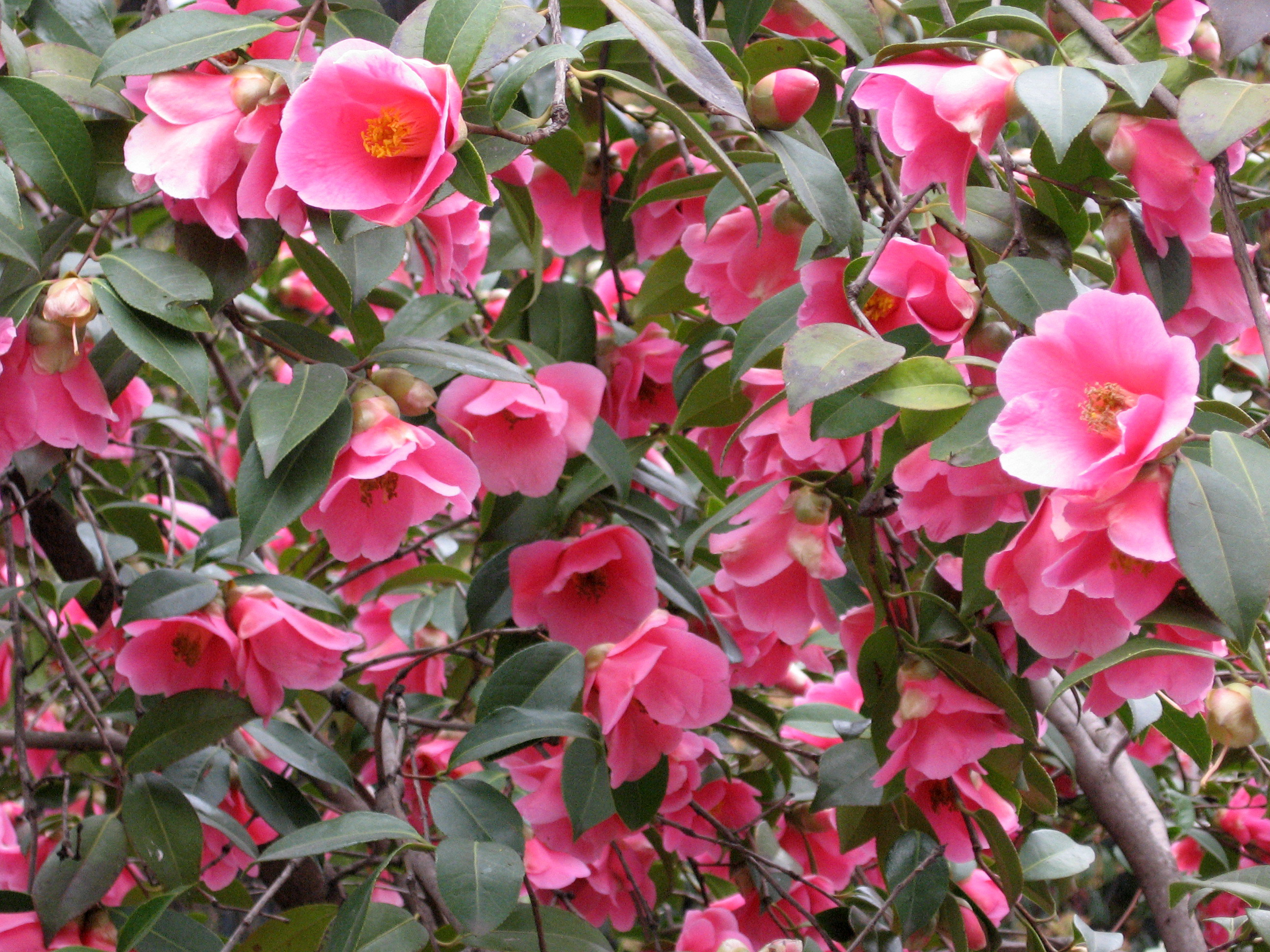 Camellia x williamsii 'Mary Christian'. Real Jardín Botánico, Madrid, España.